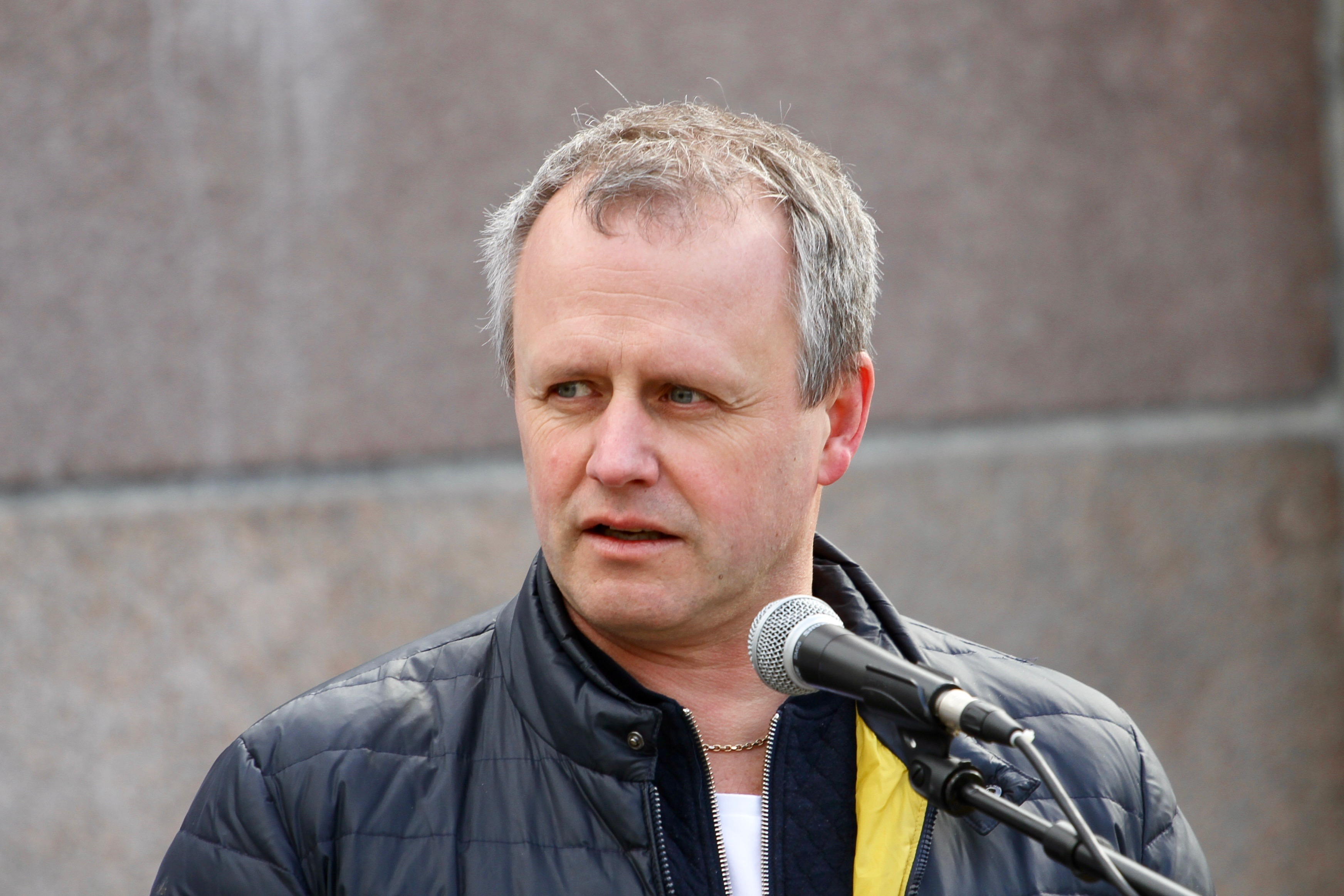 Tom Hedalen taler under Ateistenes dag 2019.